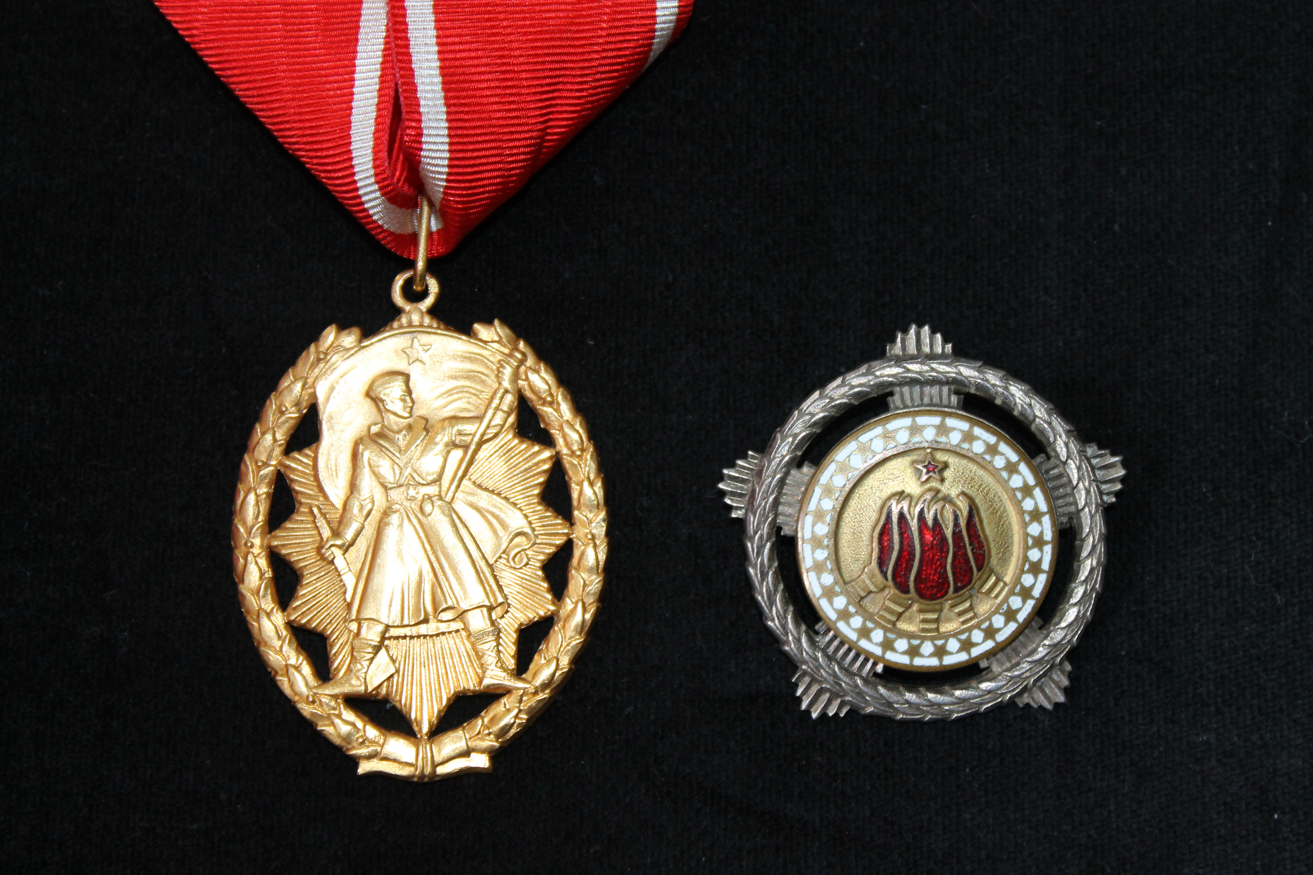 Orden narodnog heroja i Orden bratstva i jedinstva